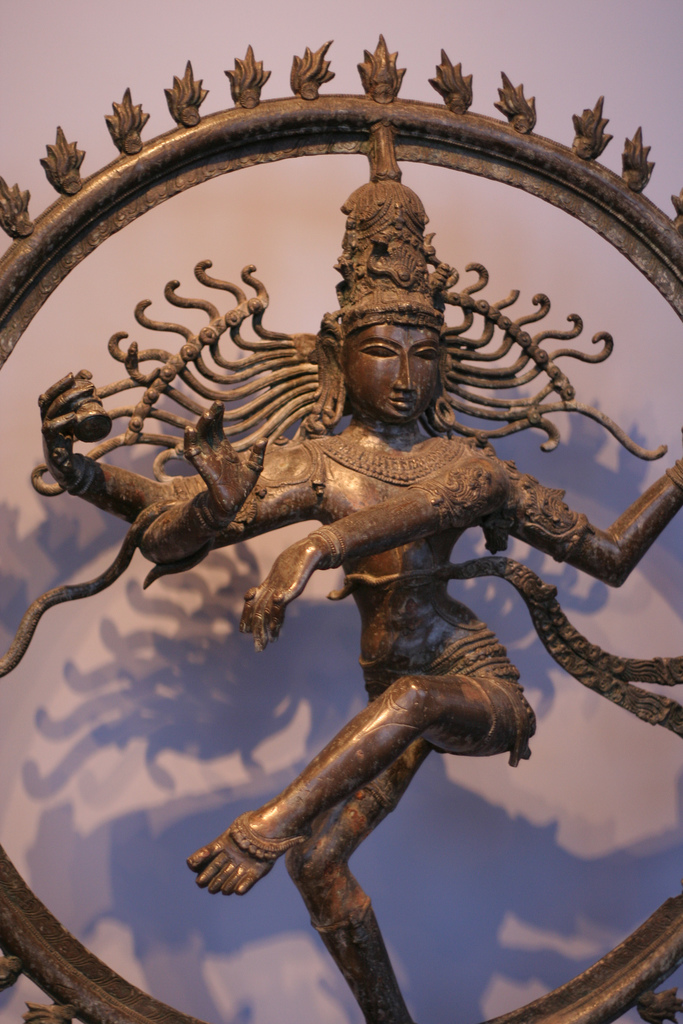 Shiva Nataraja (6274-1) Shiva Nataraja